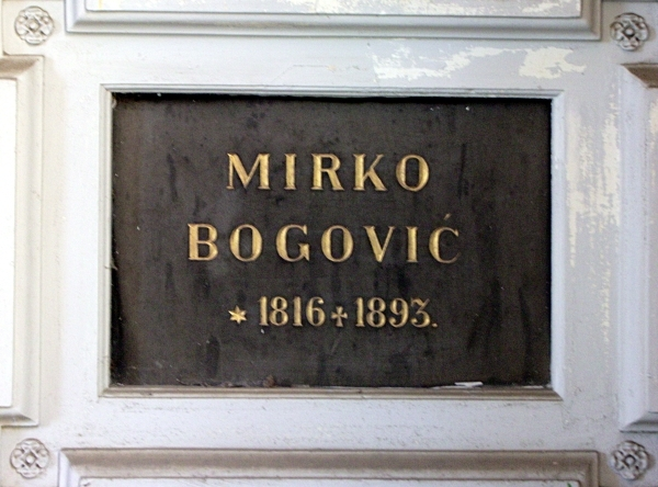 grob Mirka Bogovića na zagrebačkom Mirogoju